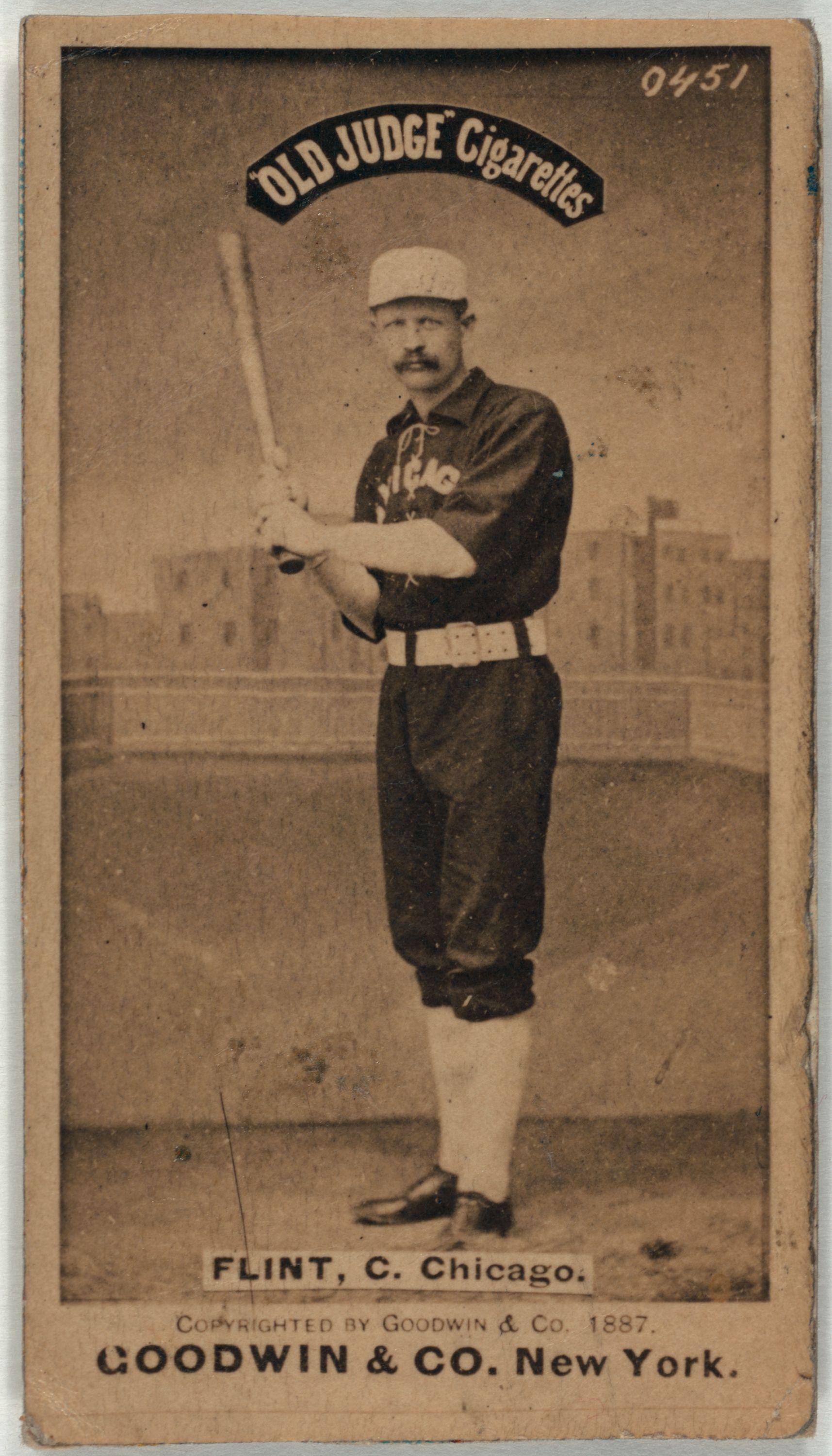 Silver Flint